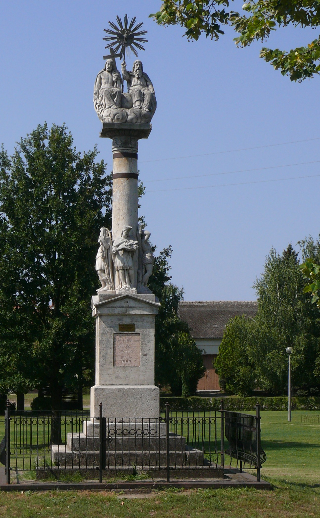 Szentháromság szobor Vaskúton a templomkertben